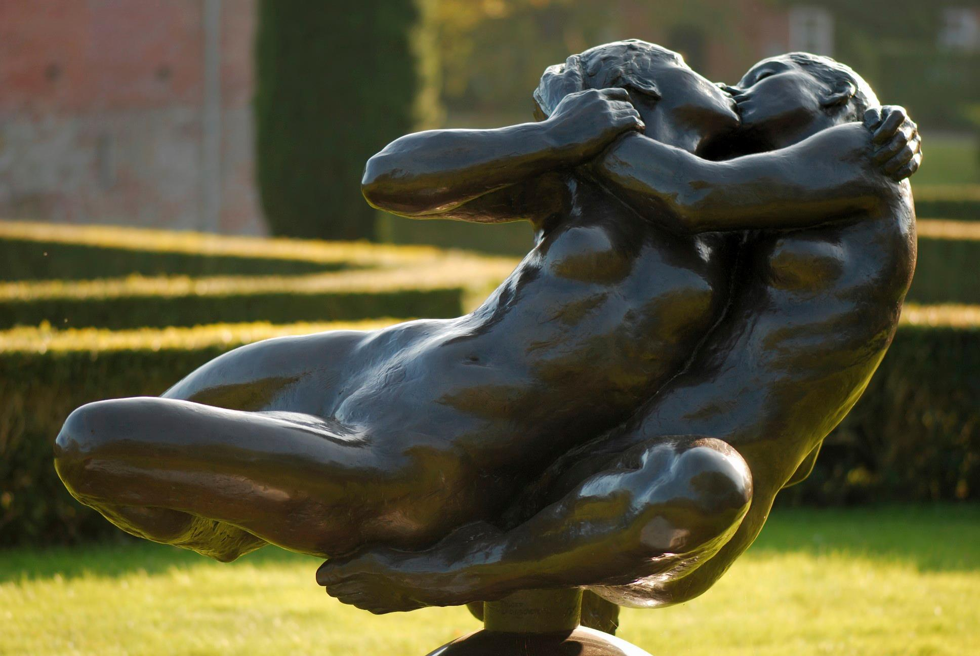 Beeldhouwwerk